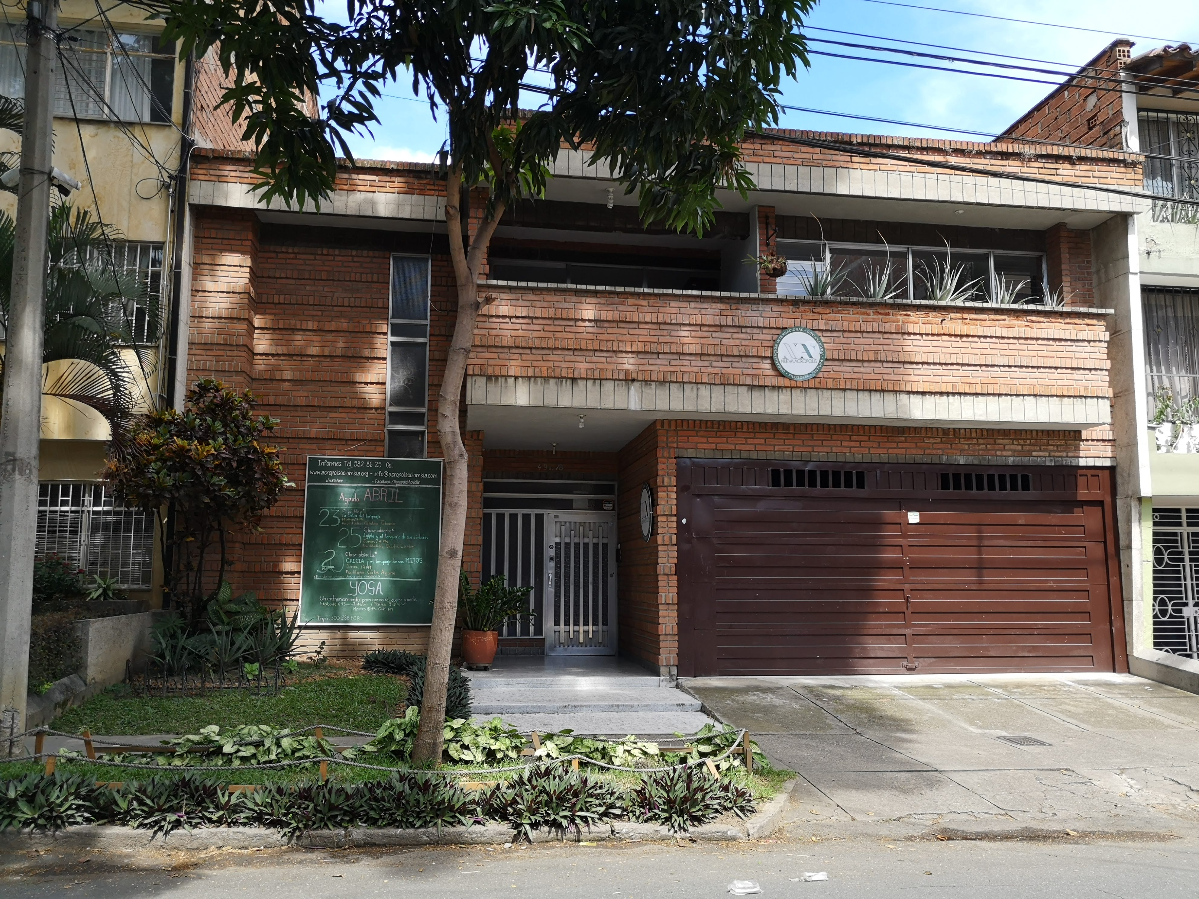 Sede de Nueva Acrópolis en Medellín